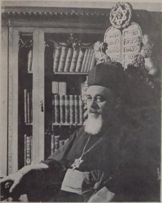 Rabinul Moses Rosen (1912-1994)